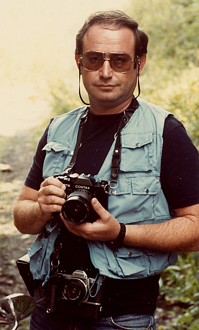 יוני המנחם